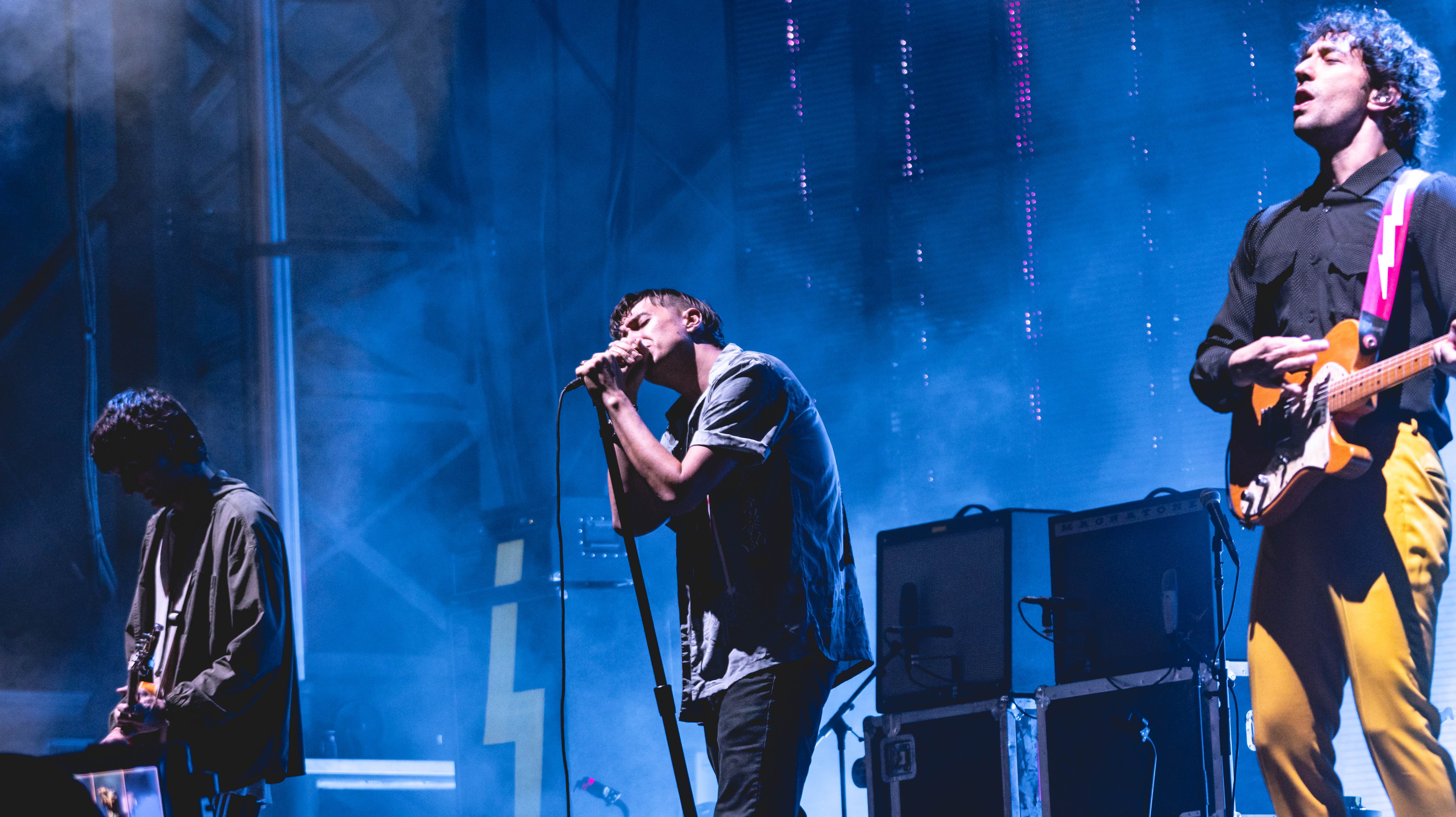 StrokesOhana270919-148